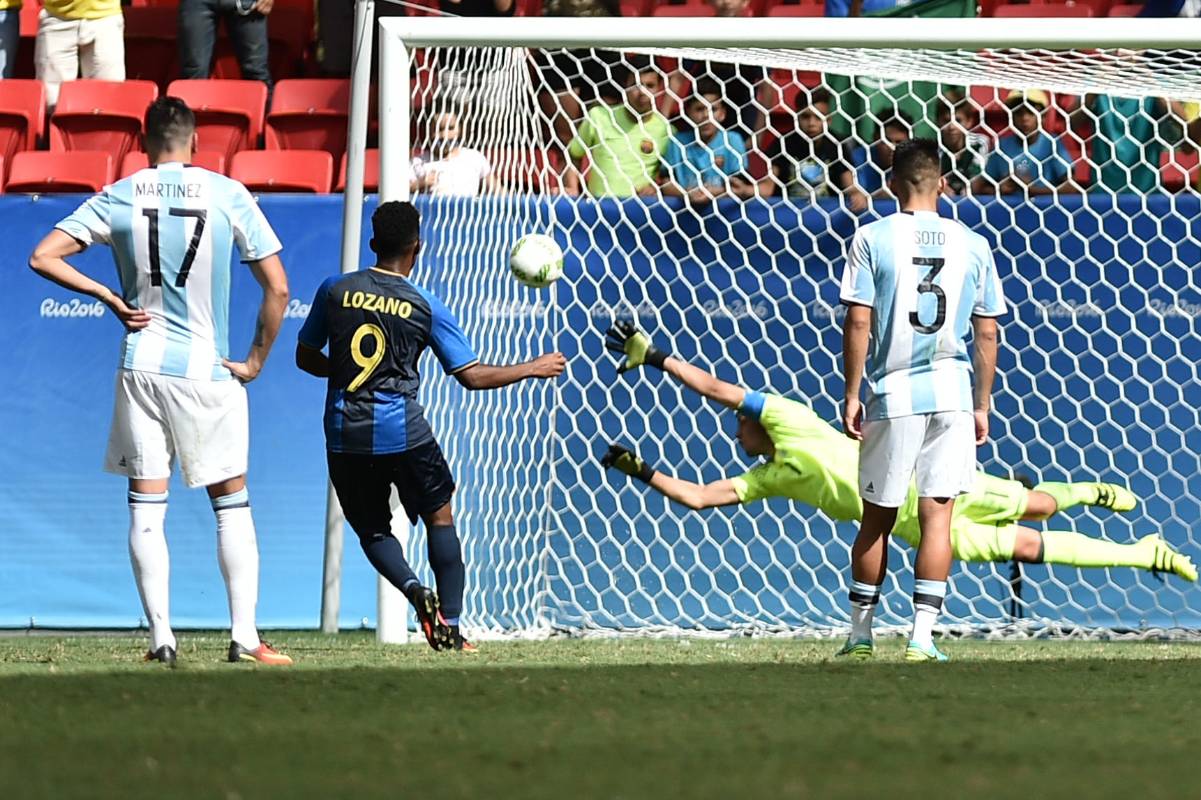 Estádio Nacional de Brasília Mané Garrincha, Brasília, DF, Brasil, 10/8/2016 Foto: Andre Borges/Agência Brasília Argentina e Honduras empataram por 1x1 nesta quarta-feira (10), no Estádio Mané Garrincha, em partida pelo grupo D do futebol masculino nas Olimpíadas 2016. O placar classificou Honduras para a próxima fase da competição e tirou a seleção argentina masculina da Olimpíada. Partido entre Argentina y Honduras por fase de grupos.